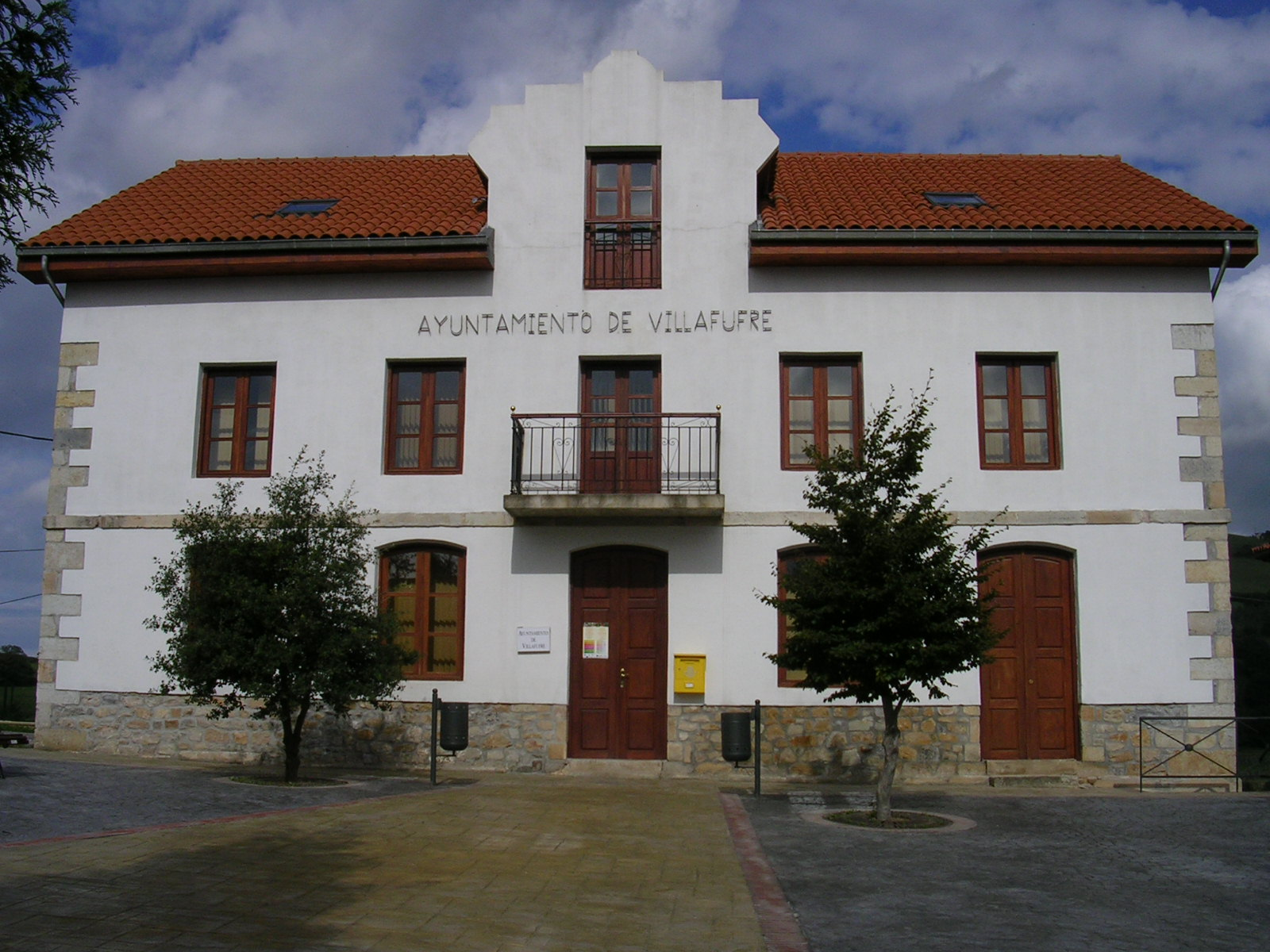 Ayuntamiento de Villafufre, en Villafufre, Cantabria